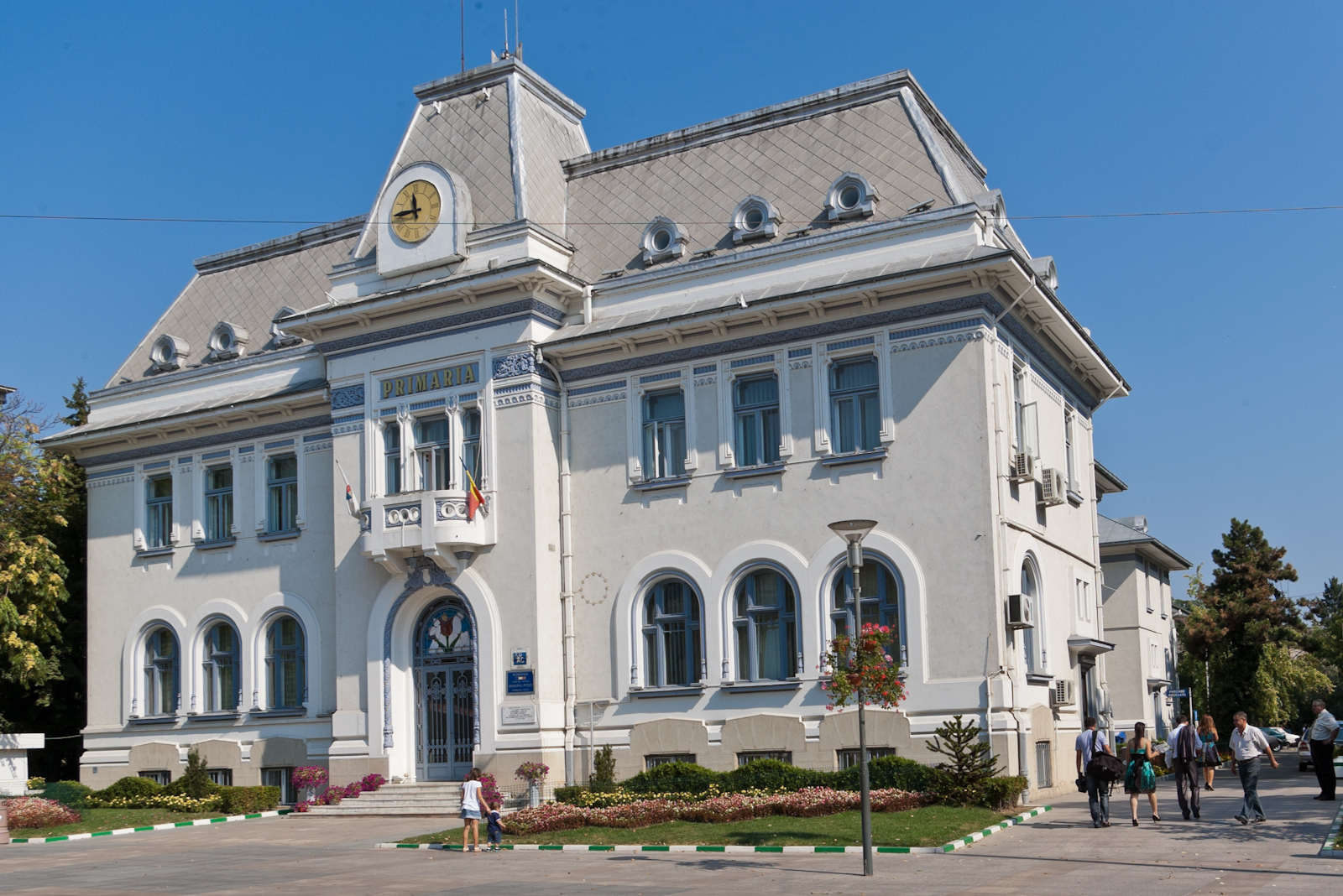 Fotografia prezinta ansmblul Primariei vazut dinspre S. 01